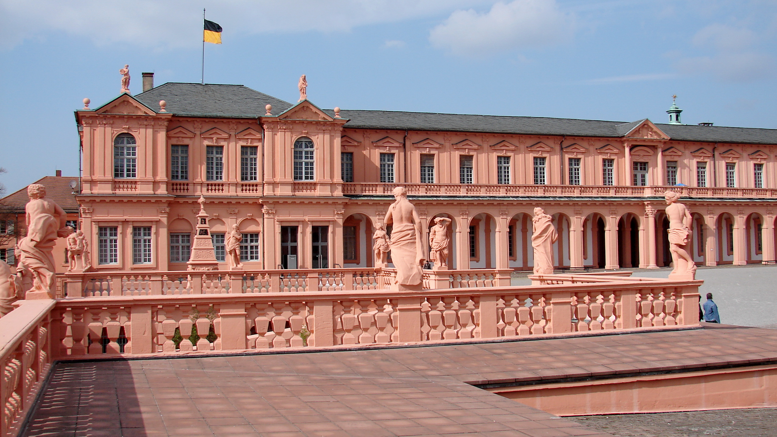 Das Schloss Rastatt (auch Barockresidenz) in Rastatt ist ein ehemaliges Residenzschloss der Markgrafen von Baden-Baden.